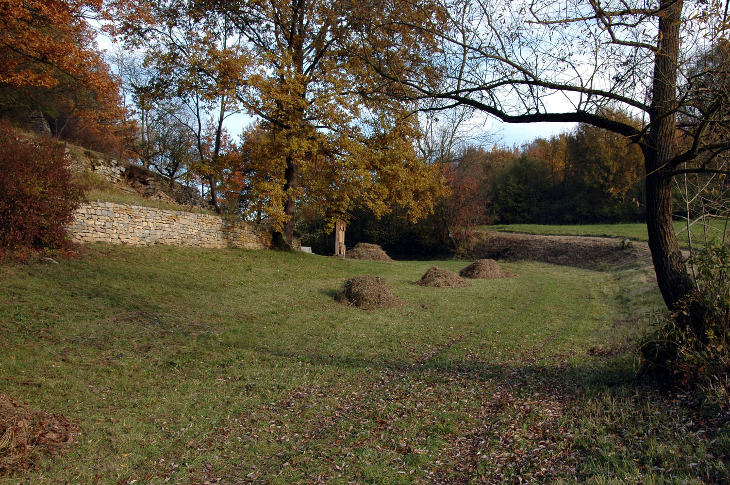 alte Schneise des Württembergischen Landgrabens am Zusammentreffen der Gemarkungen von Lauffen, Talheim und Ilsfeld.